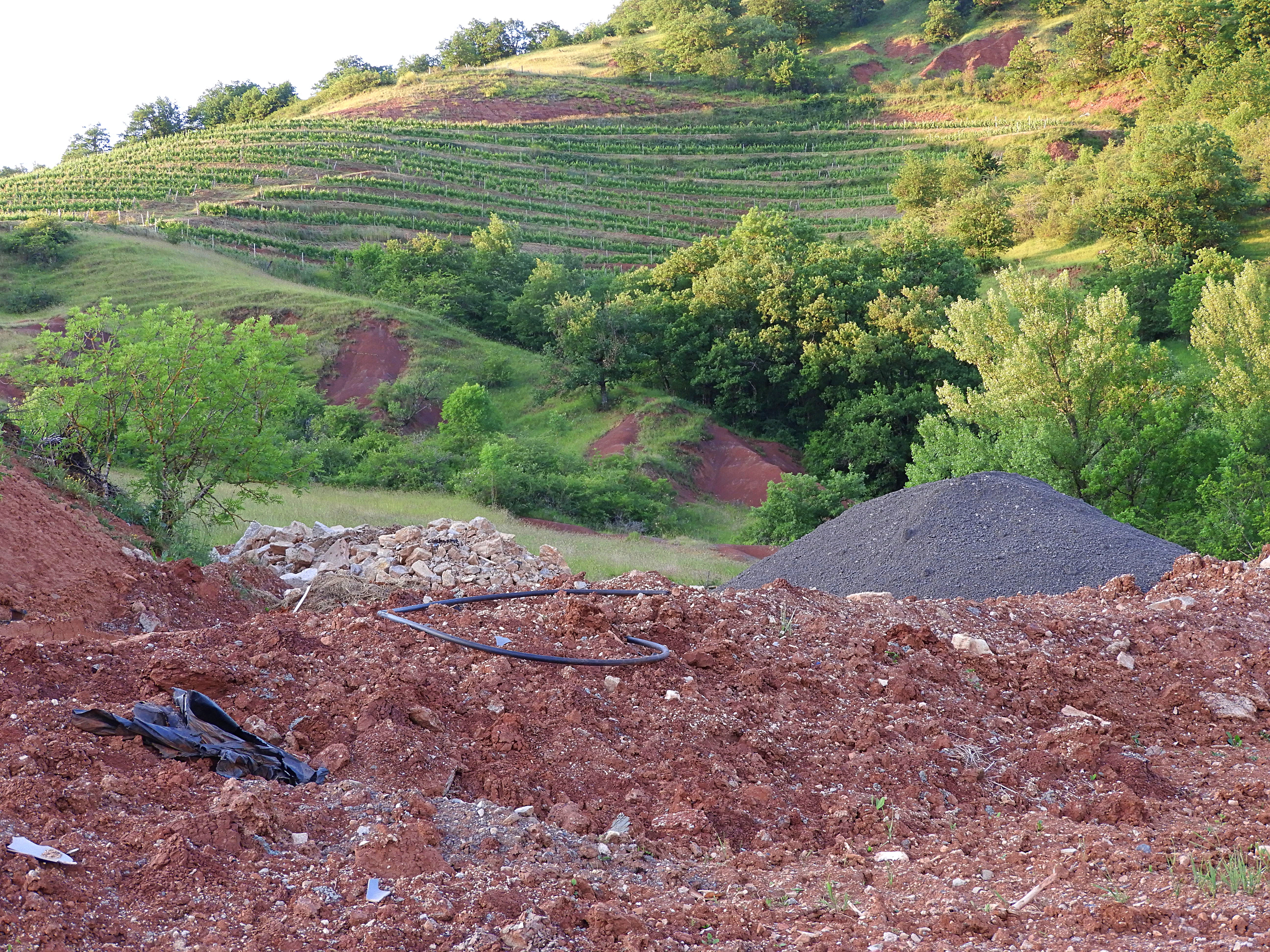 Autrefois un rougier, le sentier a été goudronné pour que les camions déversent leurs détritus : poubelles, béton, caoutchouc, bois mort pourrissant, cailloux, terre.